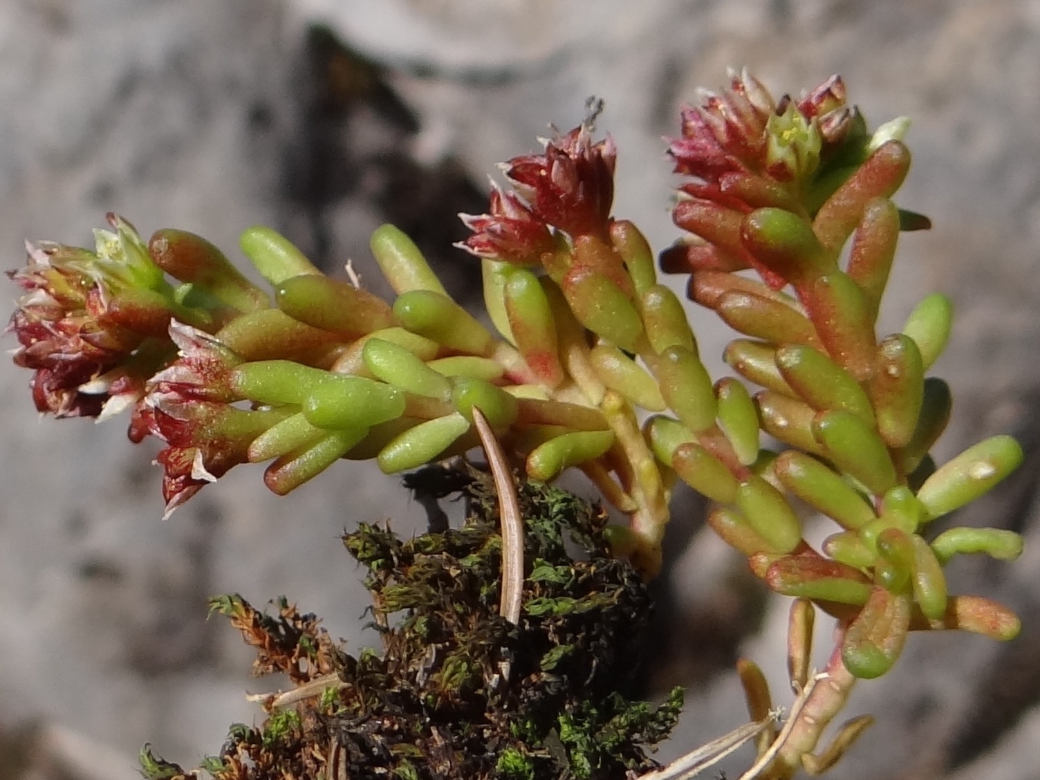 Sedum atratum (habitat:West Tatra Mountains, Wyżnia Tomanowa Polana)